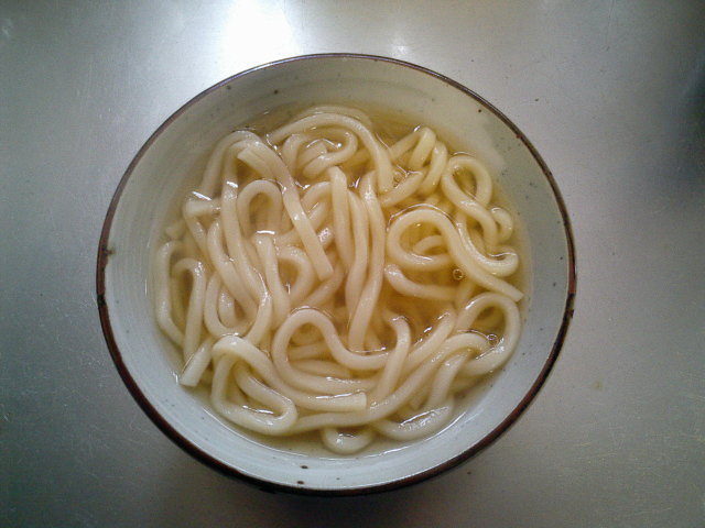 かけうどん（すうどん）、2005年1月、投稿者による撮影。